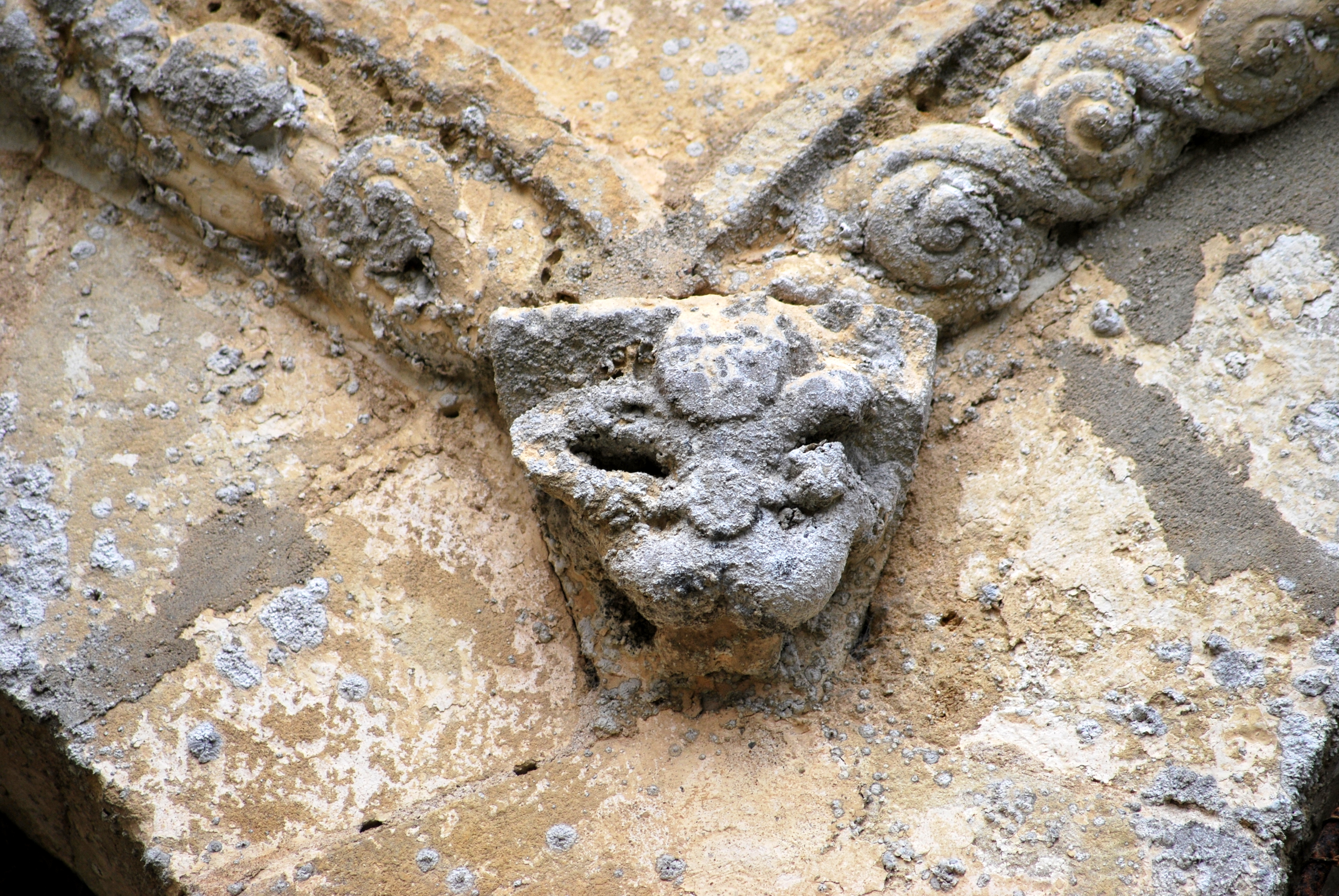 Chapiteaux de l'église Saint-Hilaire de Paillet